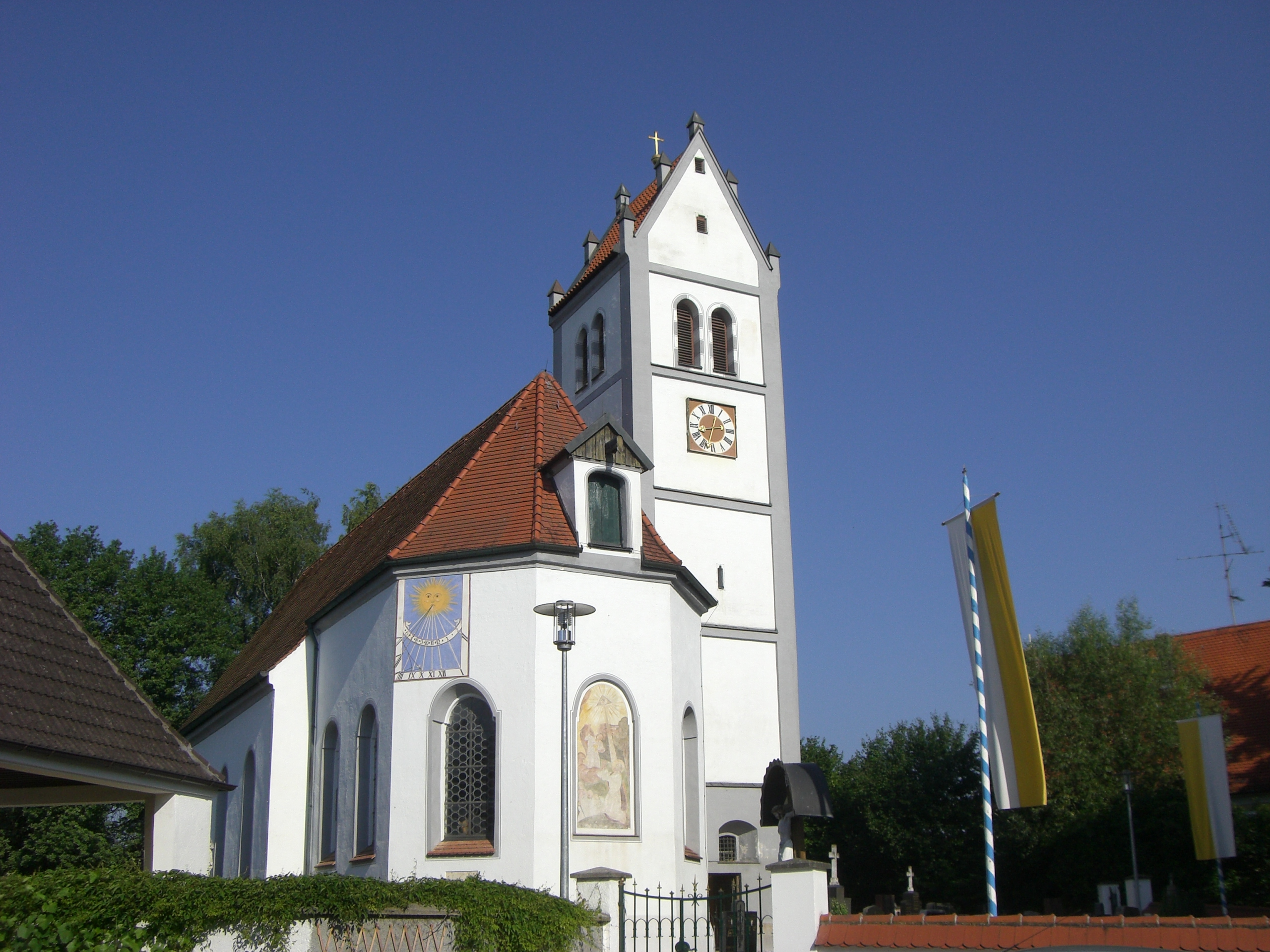 Pfarrkirche St. Nikolaus, Außenansicht